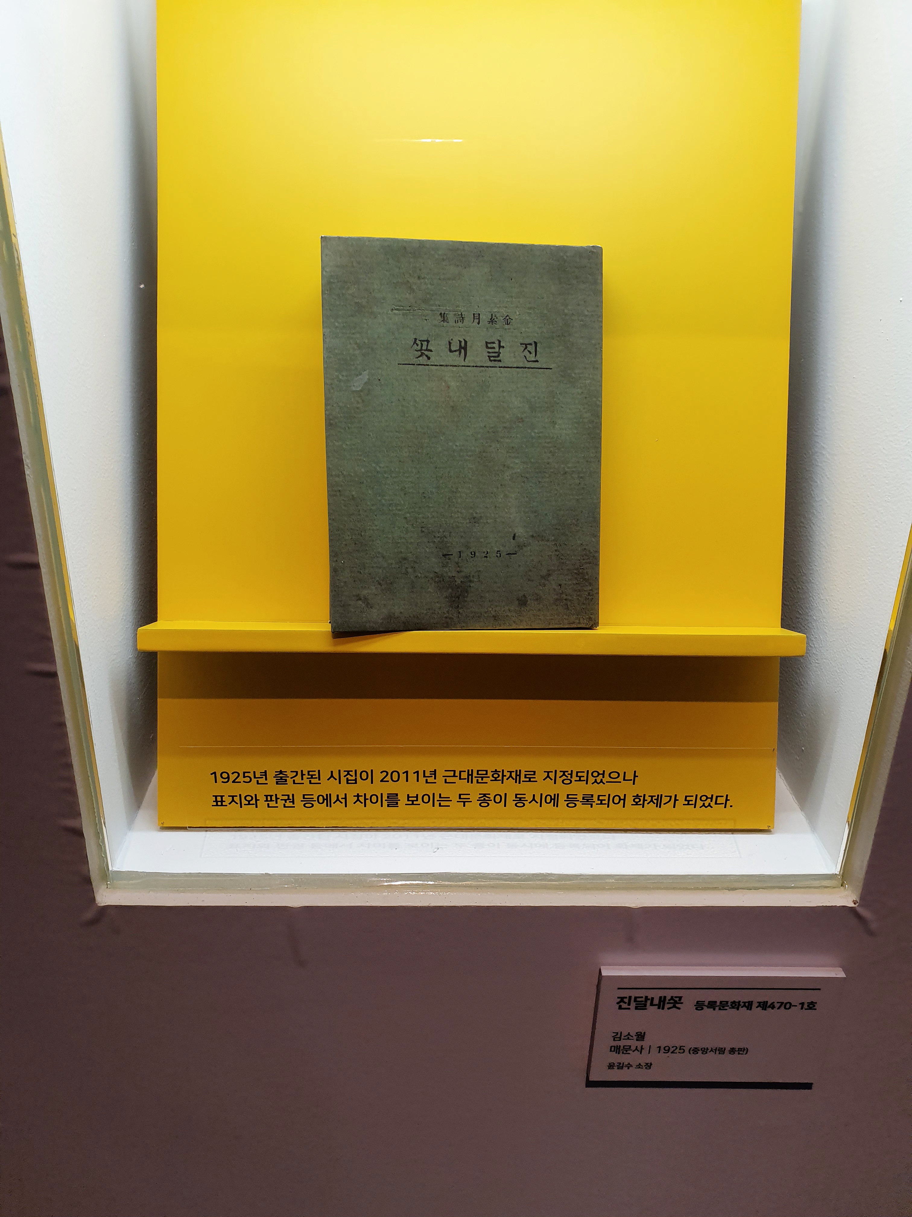 인천소재 한국근대문학관 전시물, 김소월 진달래꽃